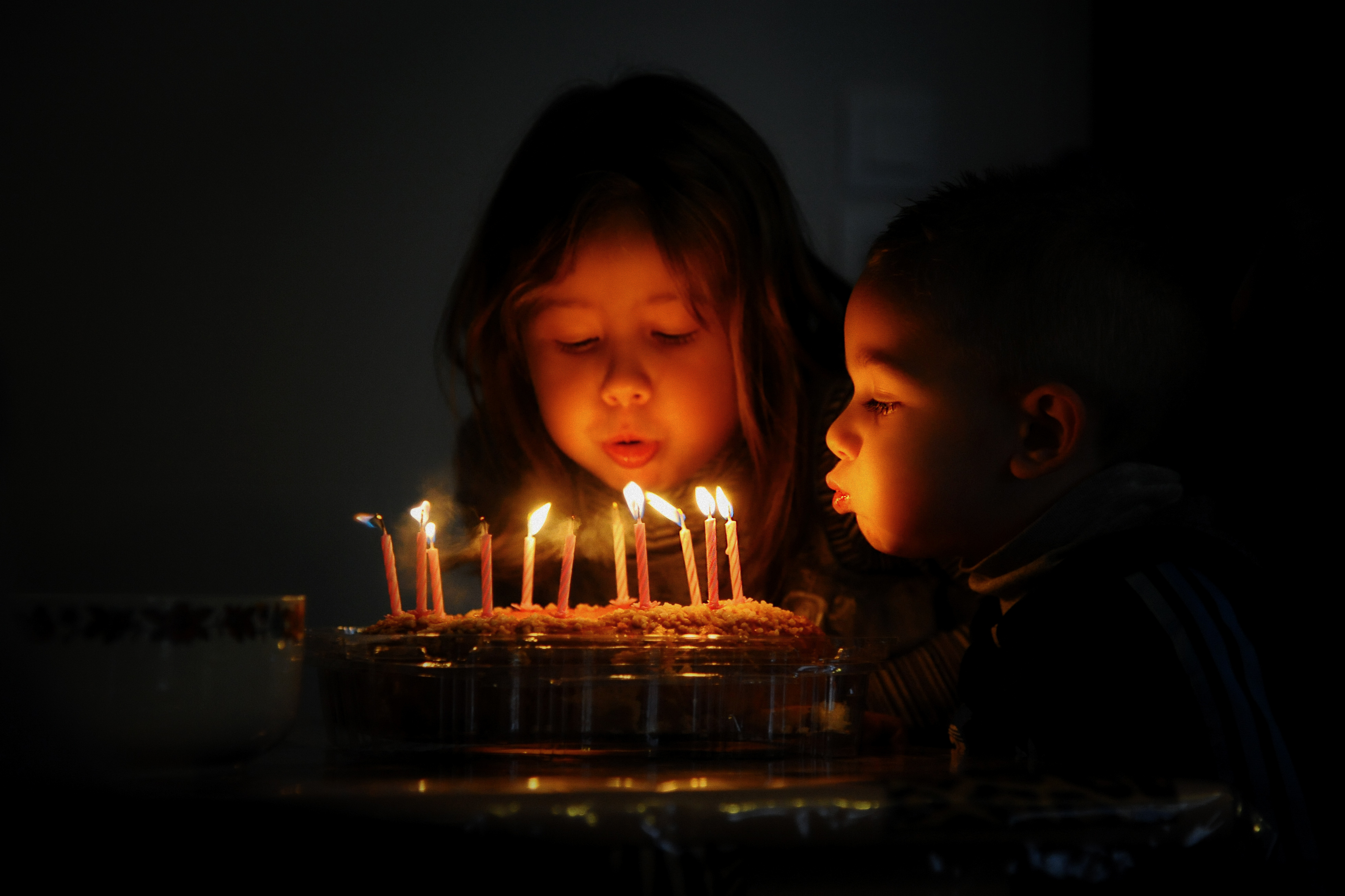 Bon anniversaire